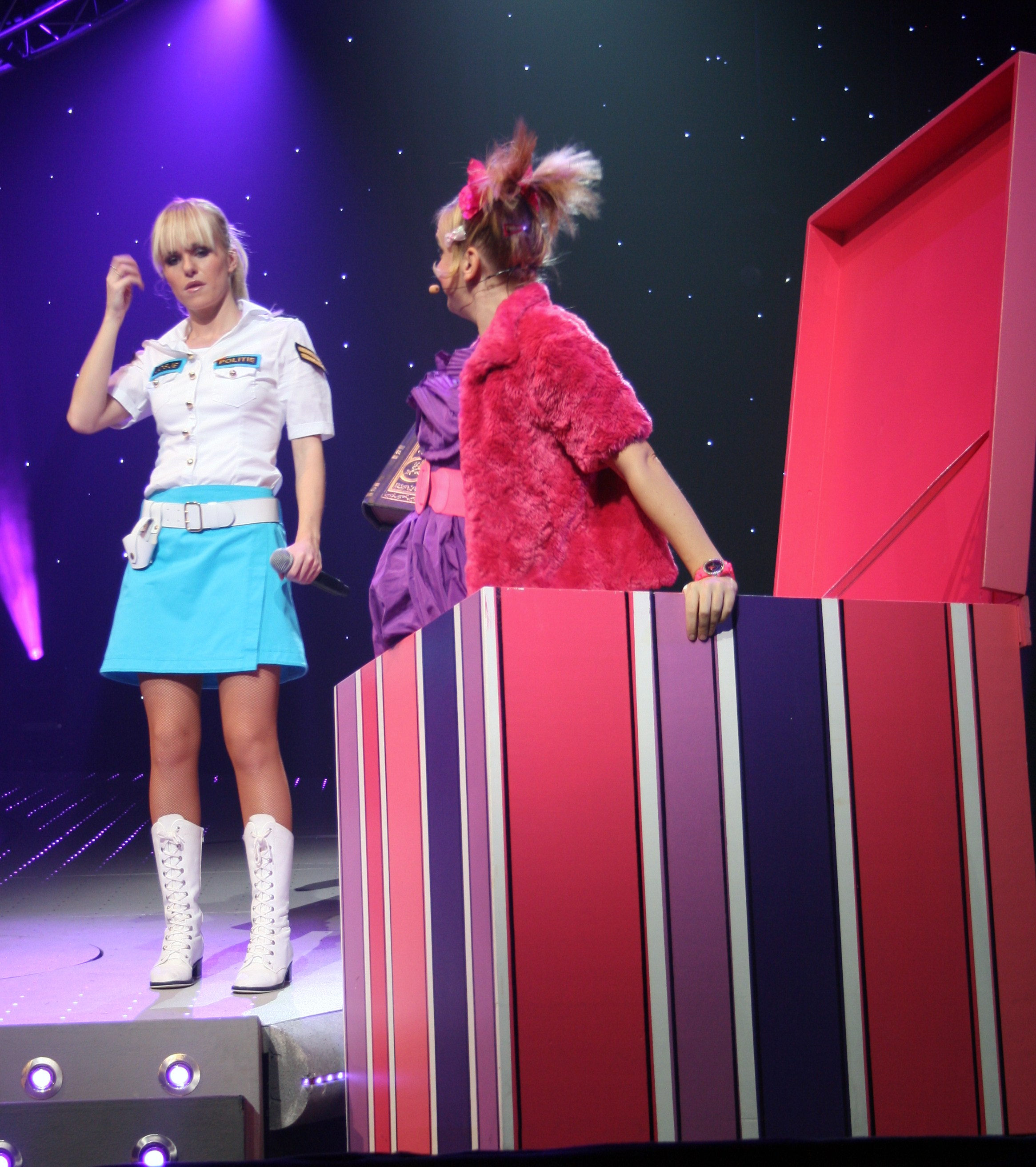 Josina (Josje) Huisman (Heusden, 16 februari 1986) is een Nederlandse zangeres en danseres. Ze is sinds 2009 de blonde zangeres van de Vlaamse meidengroep K3.